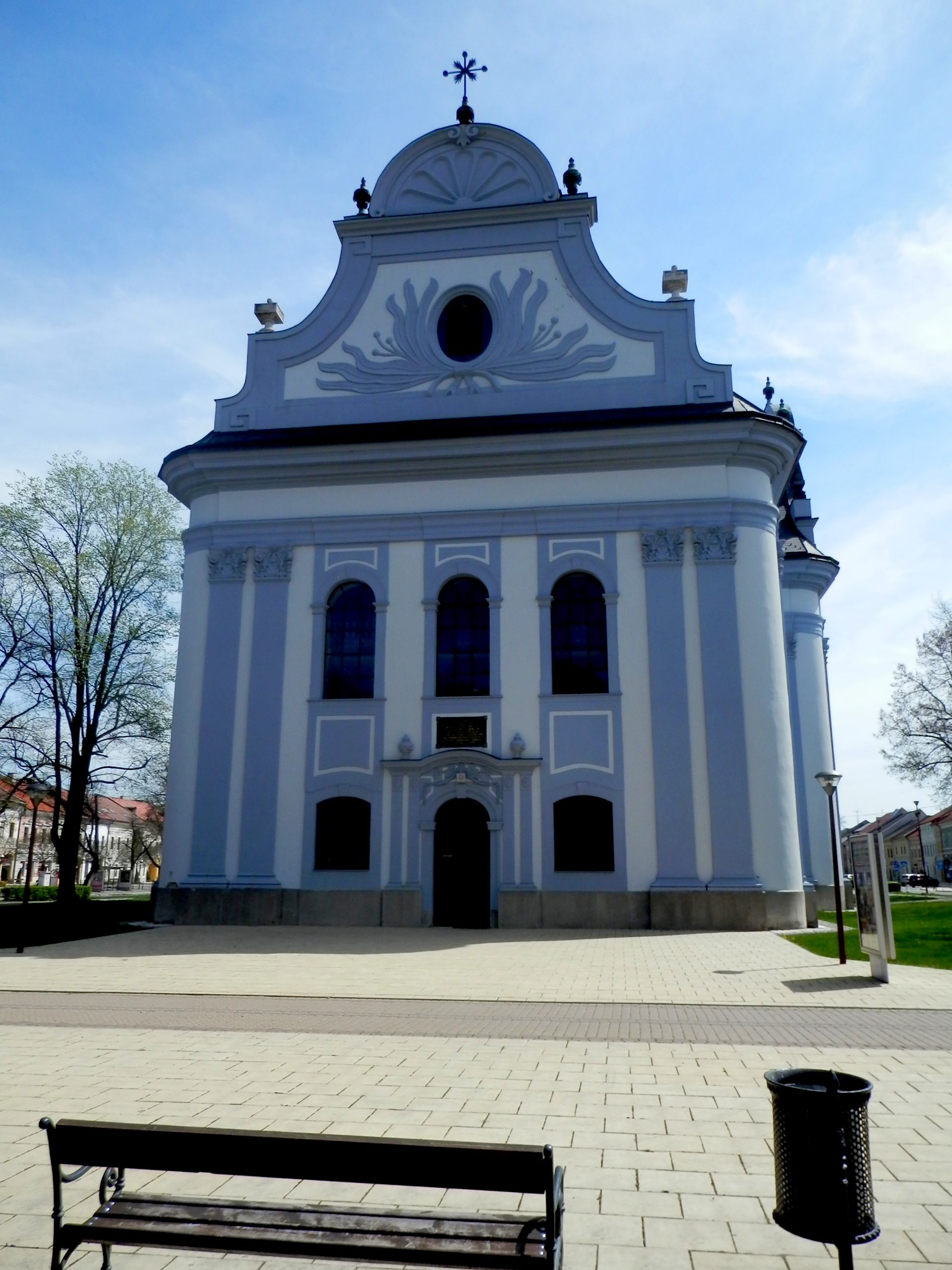 Evanjelický a. v. kostol (aj tolerančný) je vedený v zozname národných kultúrnych pamiatok SR. Prevládajúci sloh klasicizmus. Doba vzniku 1789-1796. Radničné námestie. Mesto Spišská Nová Ves.